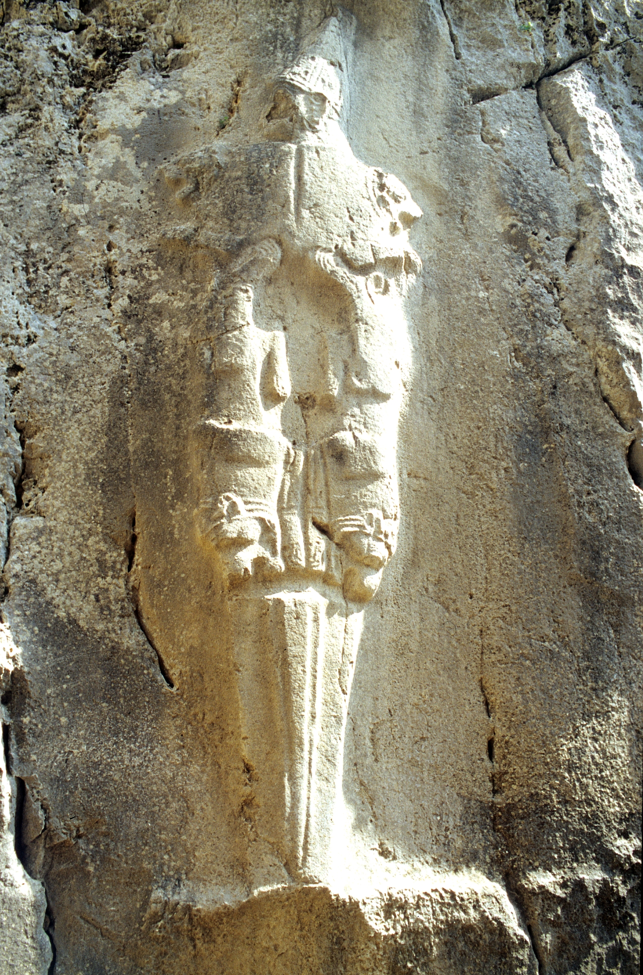 Yazilikaya, hethitisches Heiligtum bei Hattusa, Türkei, Kammer B Schwertgott Nergal